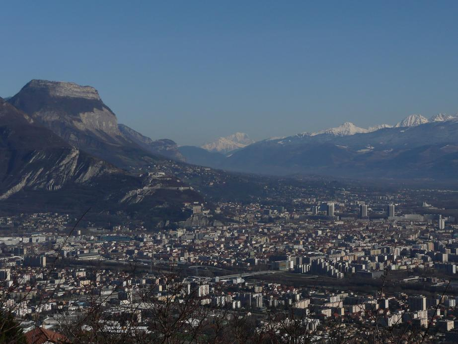 Grenoble depuis le Vercors